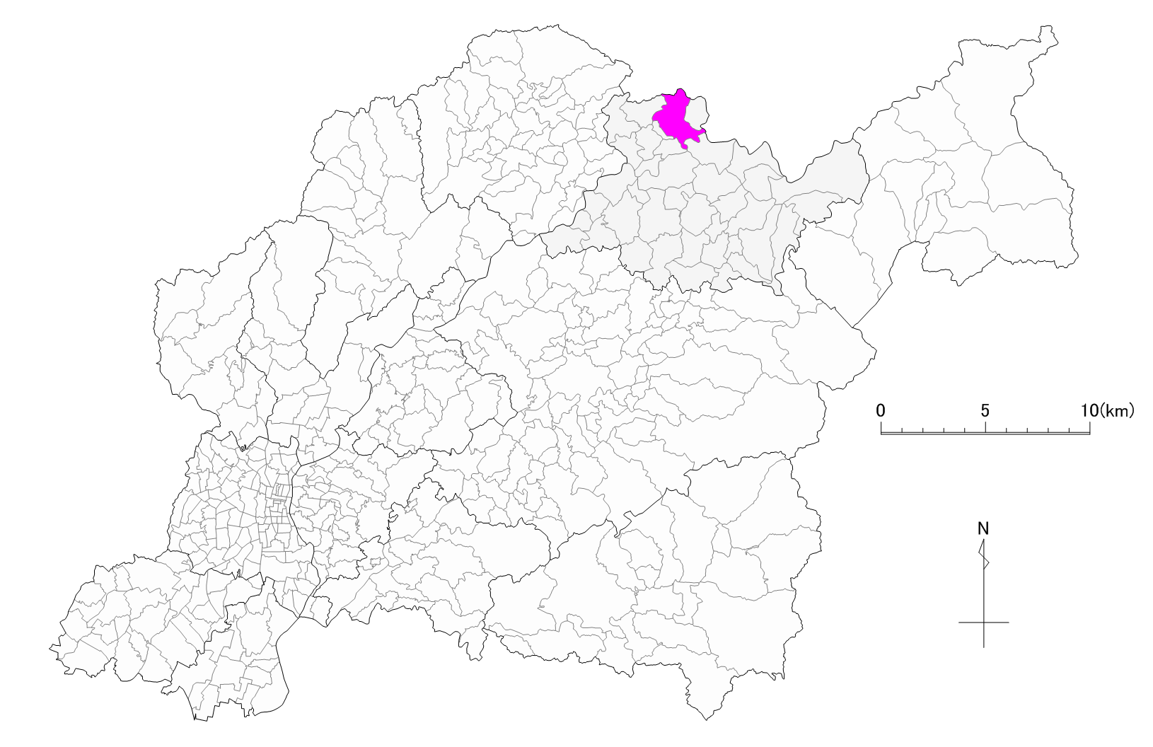 豊田市浅谷町位置図